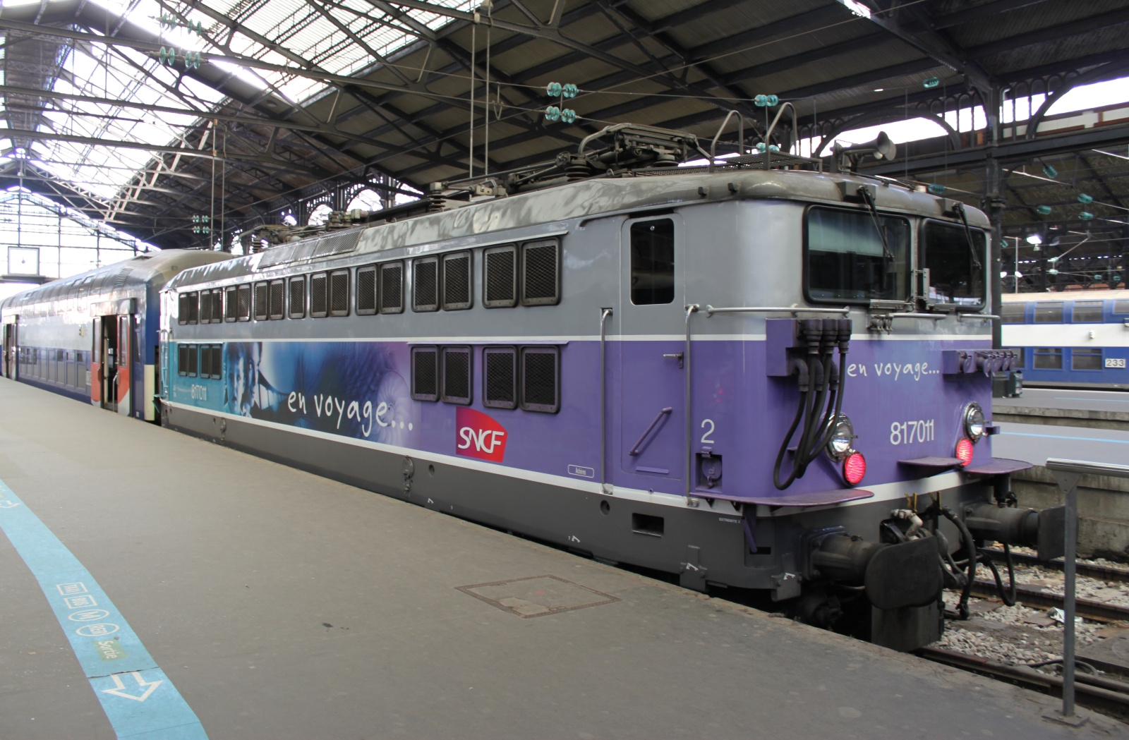 La BB17011, en livrée 'En Voyage' vient d'arriver en gare de Paris St-Lazare avec sa VB2N rénovée.